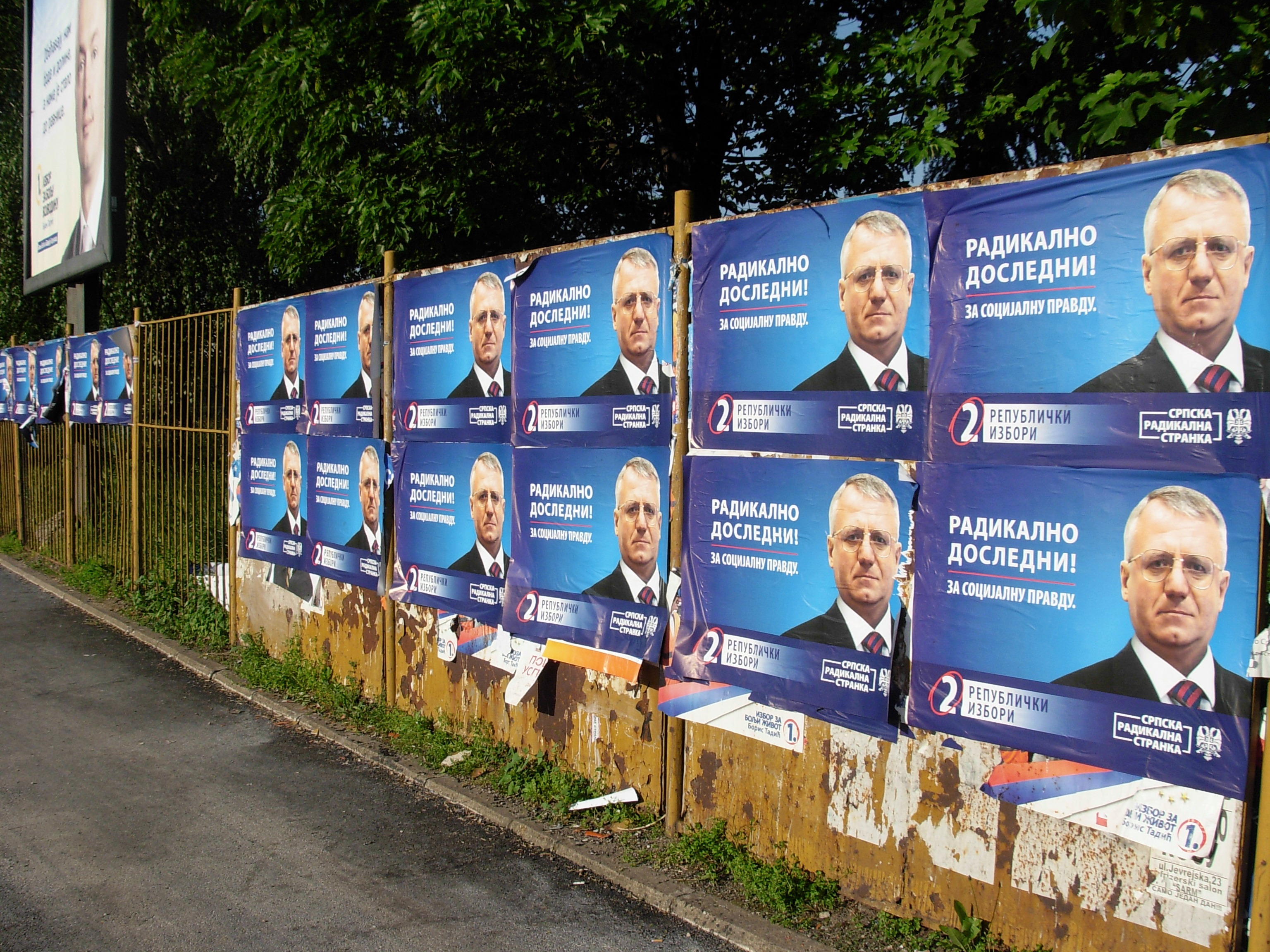 Plakati - Vojislav Šešelj, u Novom Sadu.